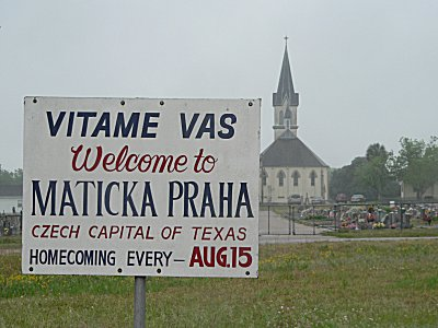 Obrázek z Prahy v americkém státě Texas vyfotografovaný Miroslavem Konvalinou zpravodajem Českého rozhlasu v USA. Autora jsem kontatktoval elektronickou poštou a se zveřejněním souhlasí.